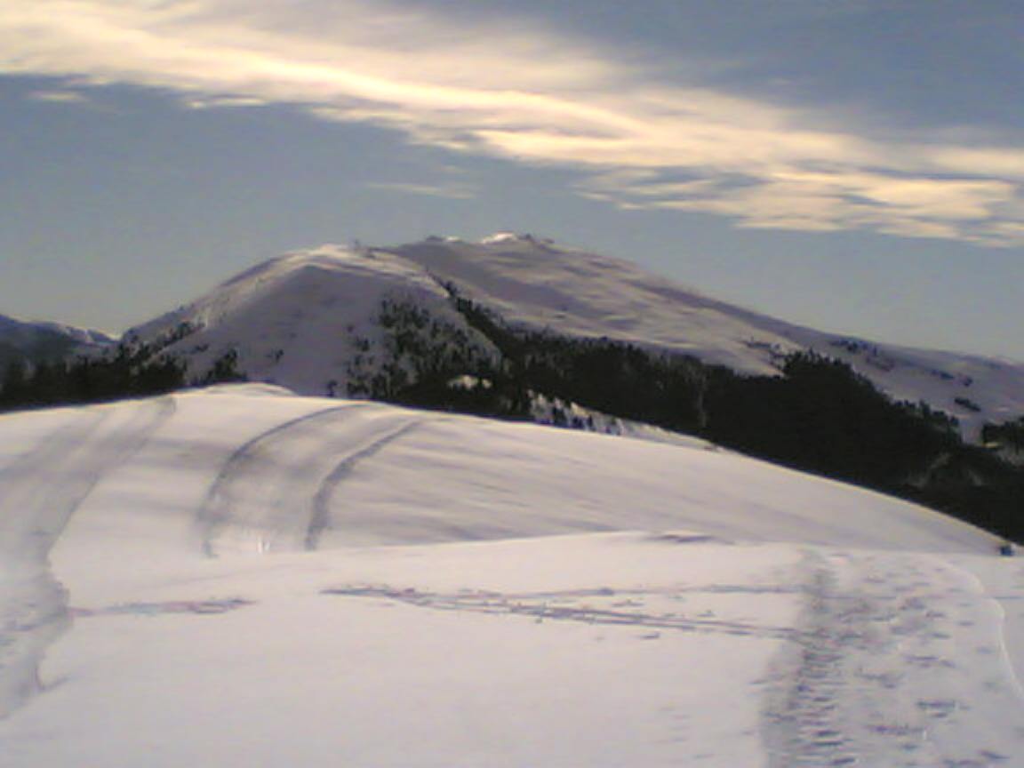 Il Monte Pora fotografato dalla cima dello Scanapà